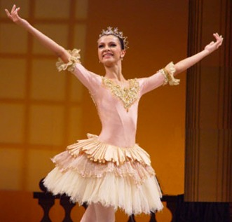 Márcia Jaqueline, Bailarina